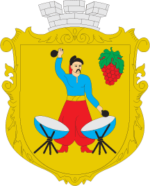 Герб смт Козацьке